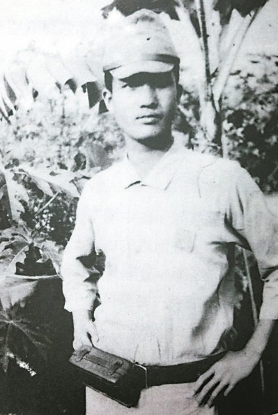 劉萬來（1929年－2016年2月17日），臺灣南投縣水里鄉人，中學教師與譯者，曾漢譯日文著作達500本以上。曾任嘉義縣文獻委員，協助編修縣志。